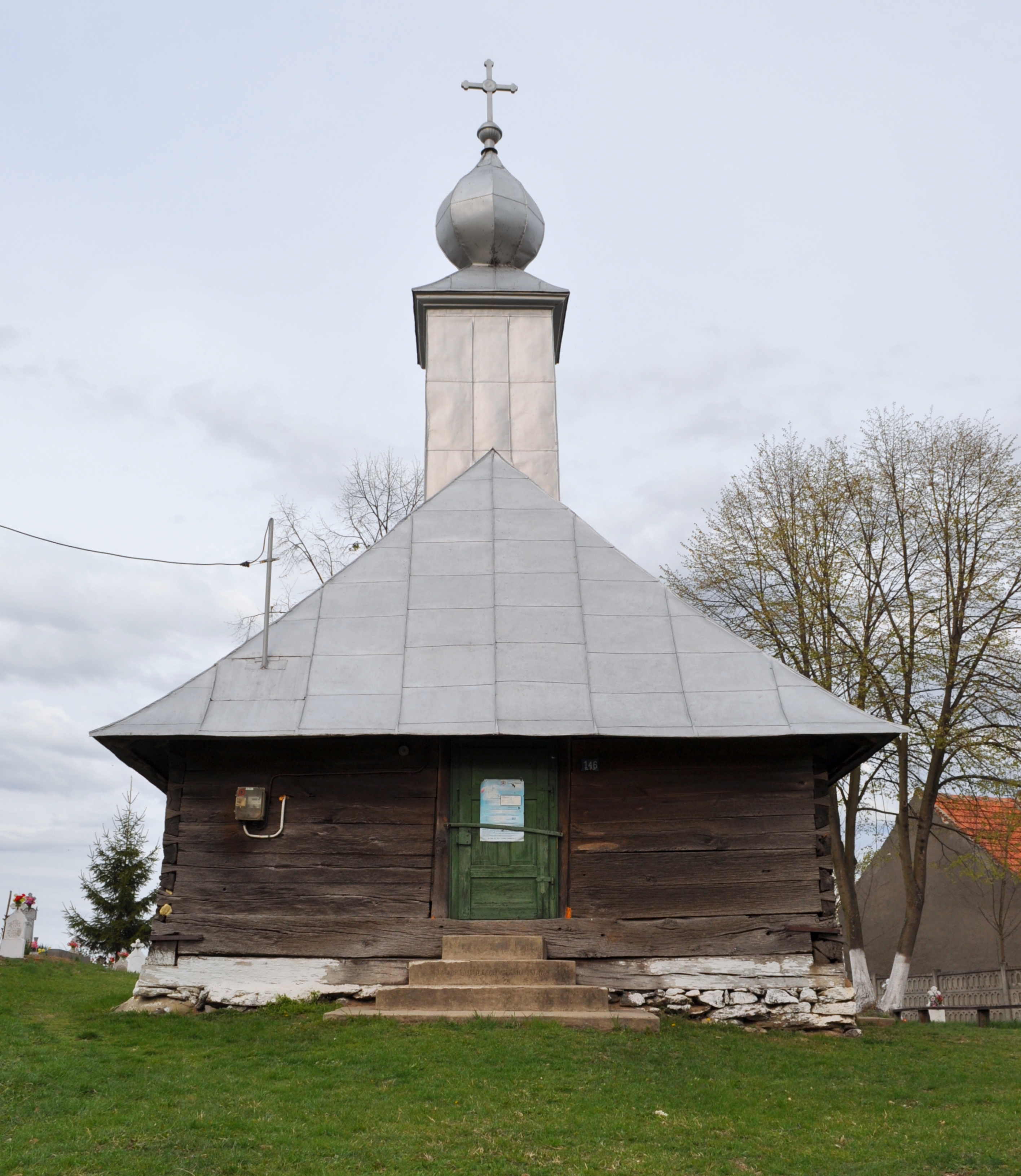 Biserica de lemn "Sfântul Dumitru" , sat DUBEŞTI; comuna OHABA LUNGĂ